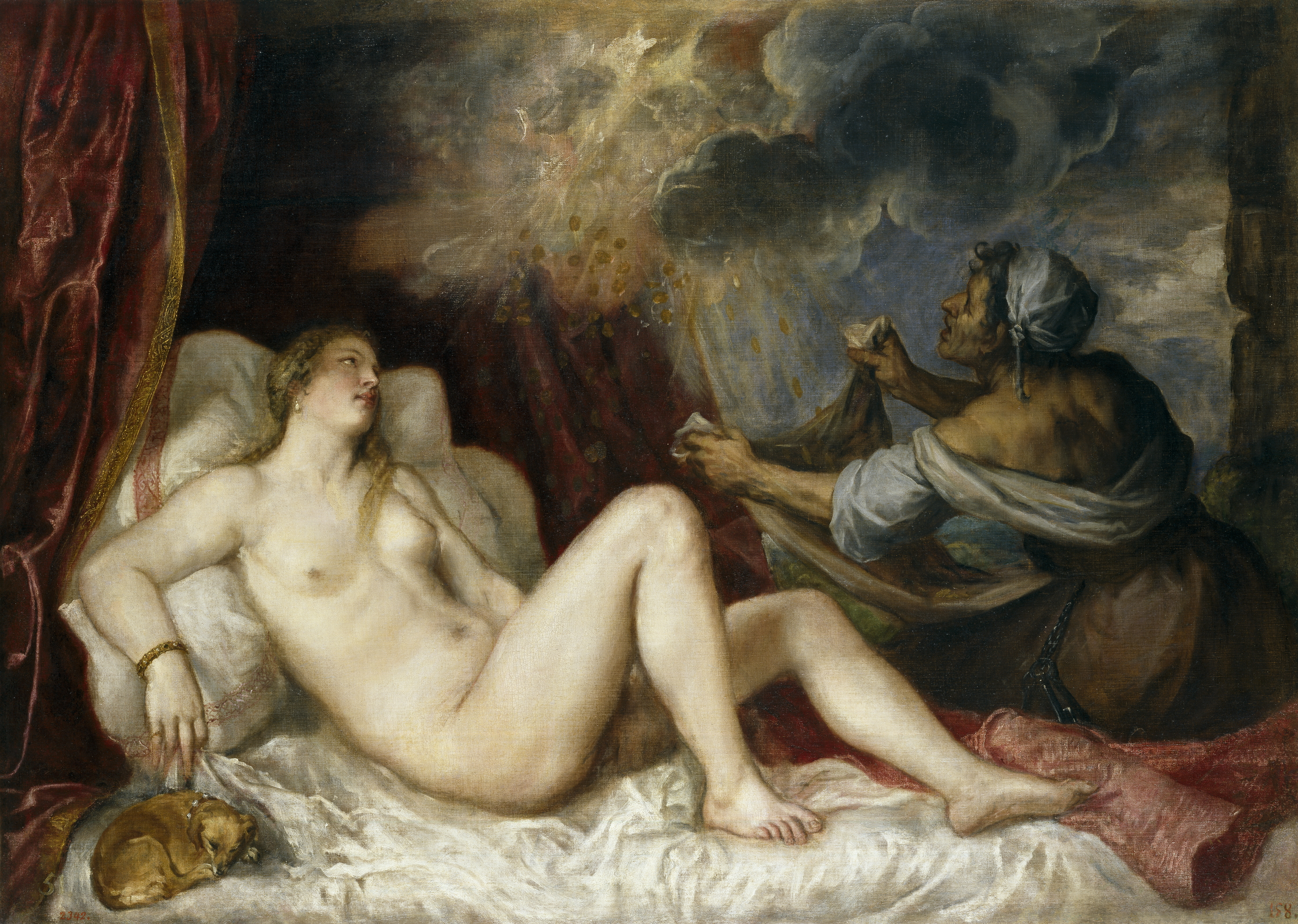 La obra representa a Dánae desnuda en su lecho y recibiendo a Zeus, que apareció en forma de lluvia de oro y la dejó embarazada.